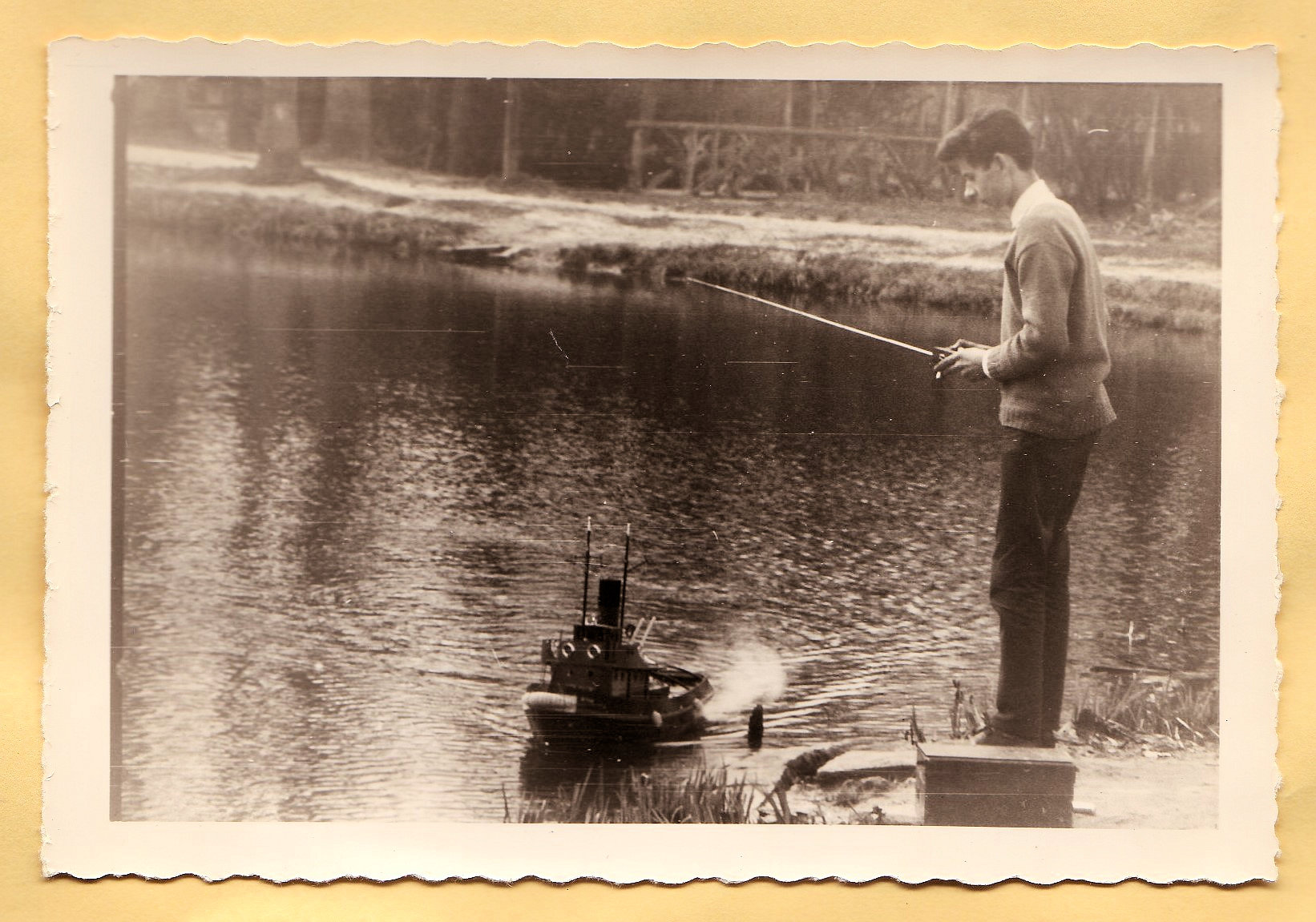 Au lac d'Orsay - Seine et Oise (Essonne depuis 1968) en 1963 ou 64.